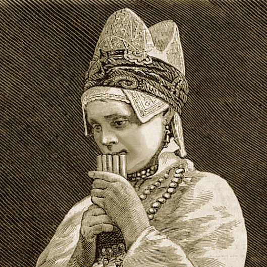 Кугиклы. Фрагмент рисунка «Типы куряков села Высокого по реке Реуту». "Всемирная иллюстрация", 1871, №16. Фрагмент.